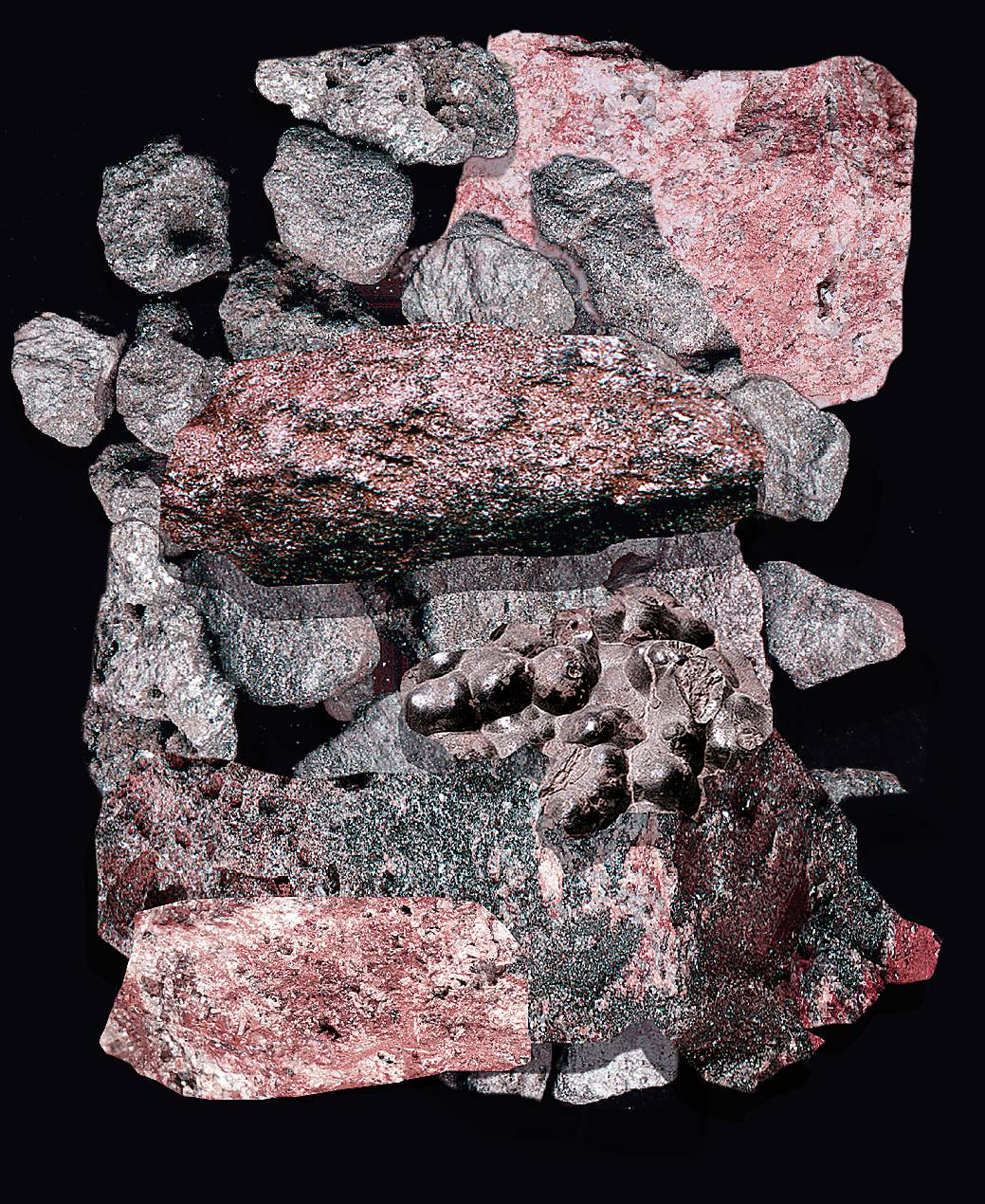 Roteisenerze (Hämatit) von Suhl (Thüringer Wald). selbst fotografiert